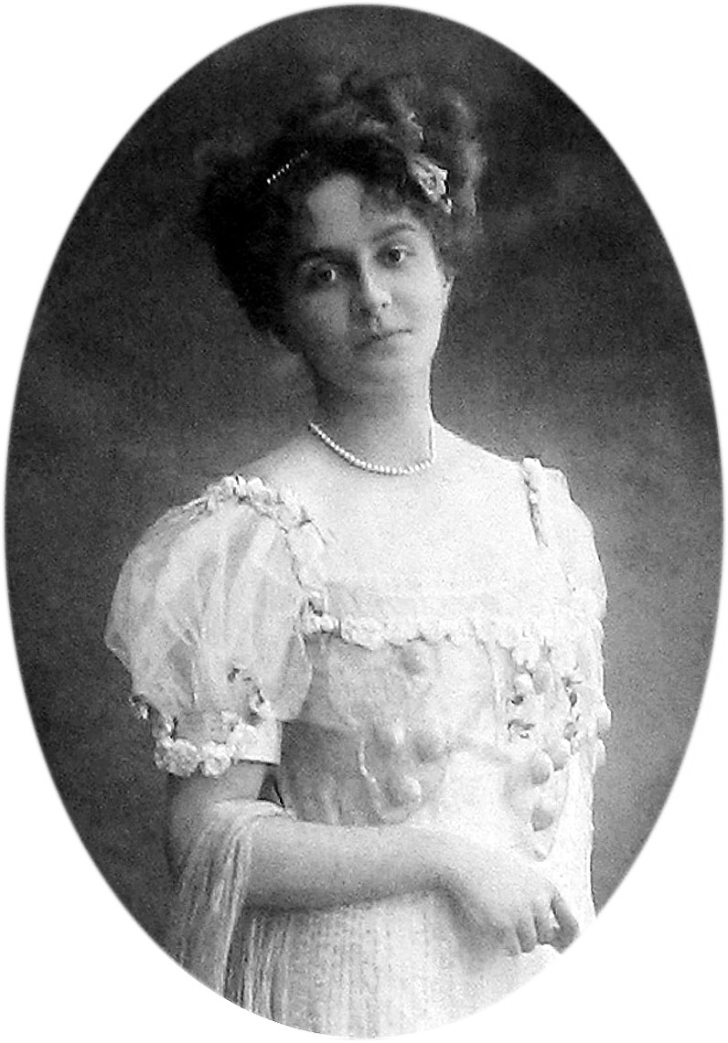 Photographie de Marie Bonaparte datée du 20 août 1905. L'originale est dédicacée à Edmond Blanc, oncle maternel de Marie Bonaparte.